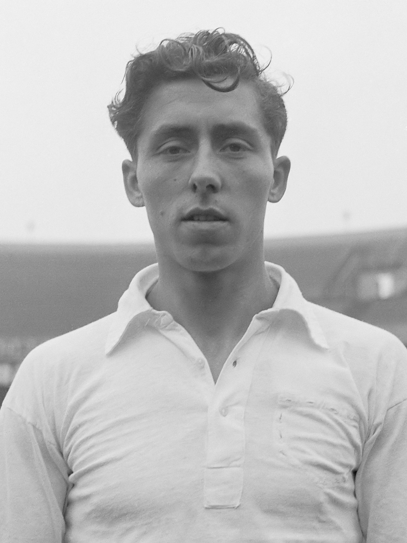 Debutanten Nederlands elftal, Klaas Smit (Alkmaar) 1 januari 1956